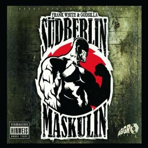 Cover des Albums „Südberlin Maskulin“ (Premium Edition)